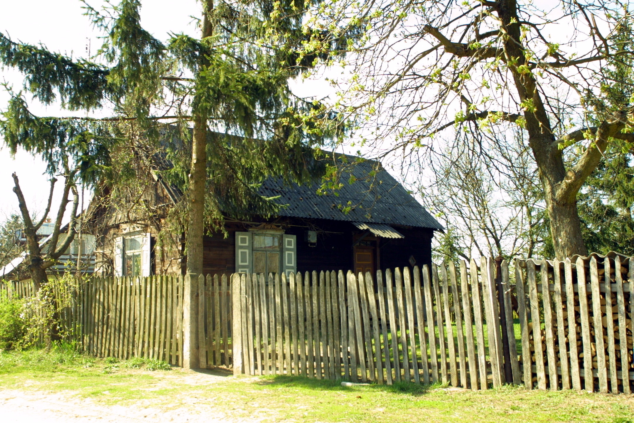 Kaczkowo Nowe. Chata kurpiowska w Puszczy Białej